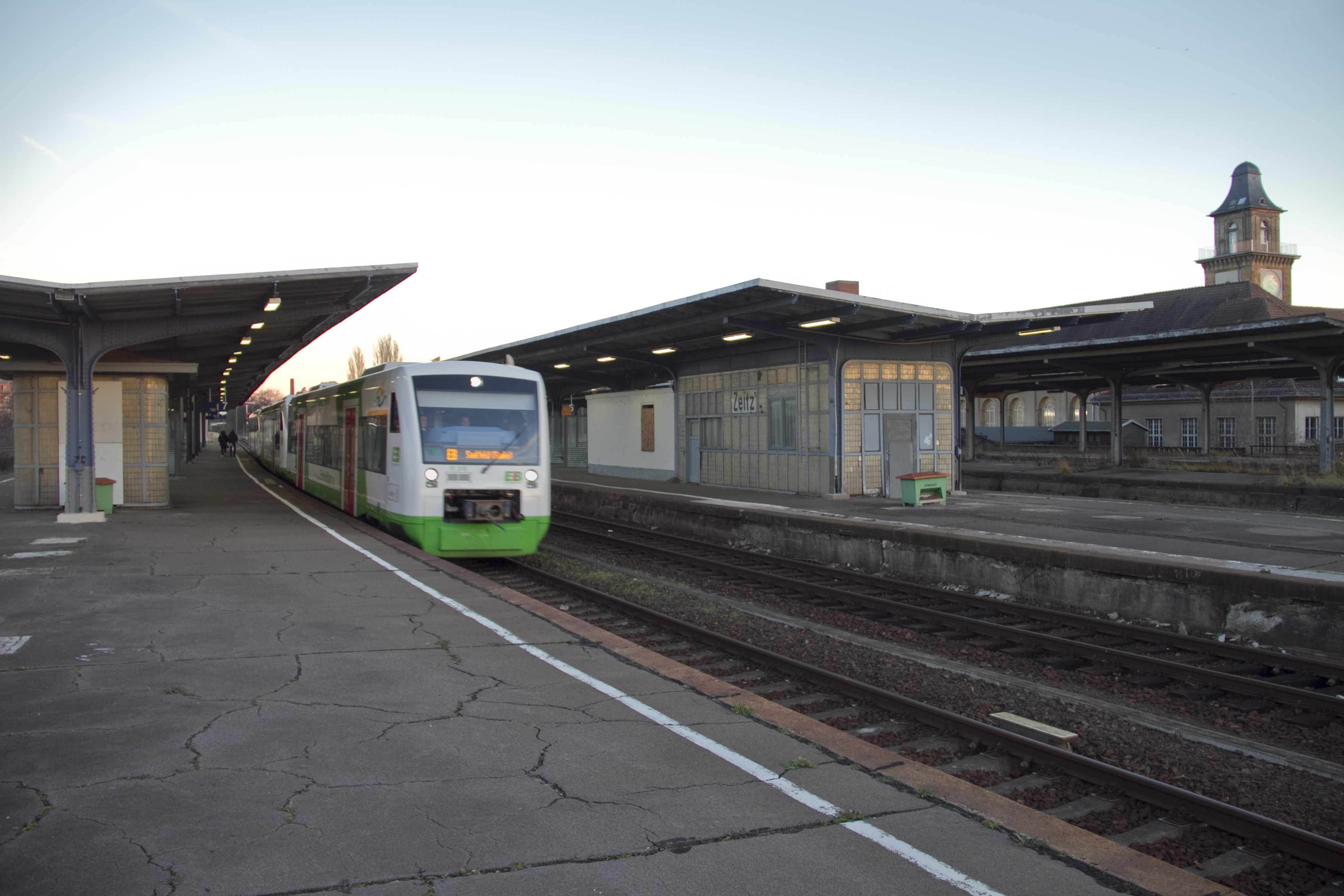 Bahnhof Zeitz, Erfurter Bahn in Richtung Gera